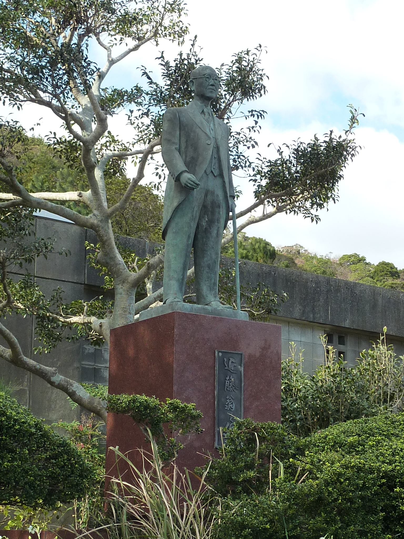 愛知県田原市高松町の赤羽根運動広場にある近藤寿市郎像